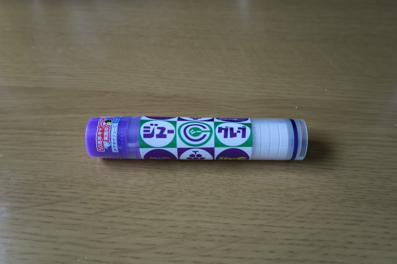 ジューＣ（グレープ）